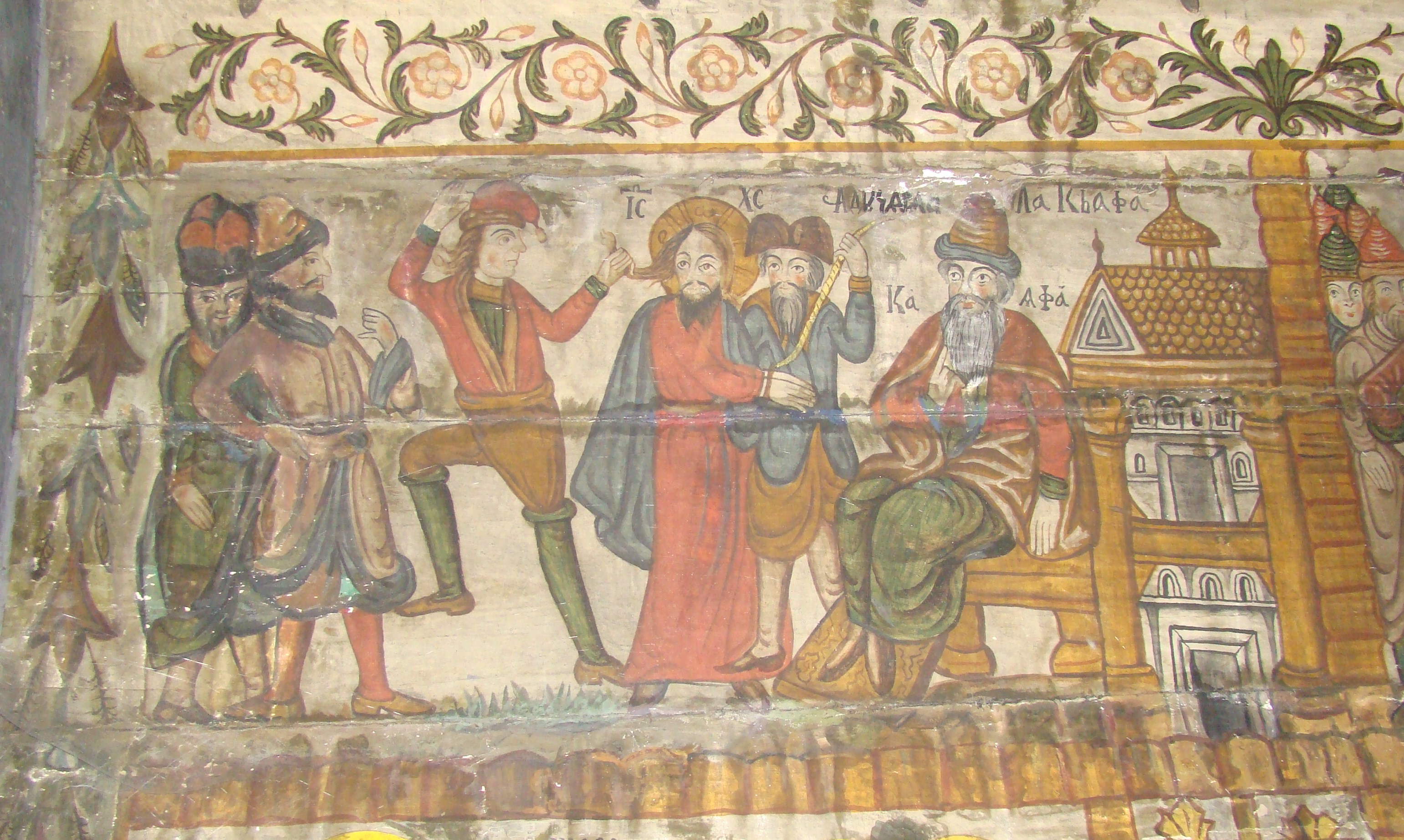 Biserica de lemn din Ticu-colonie, județul Cluj